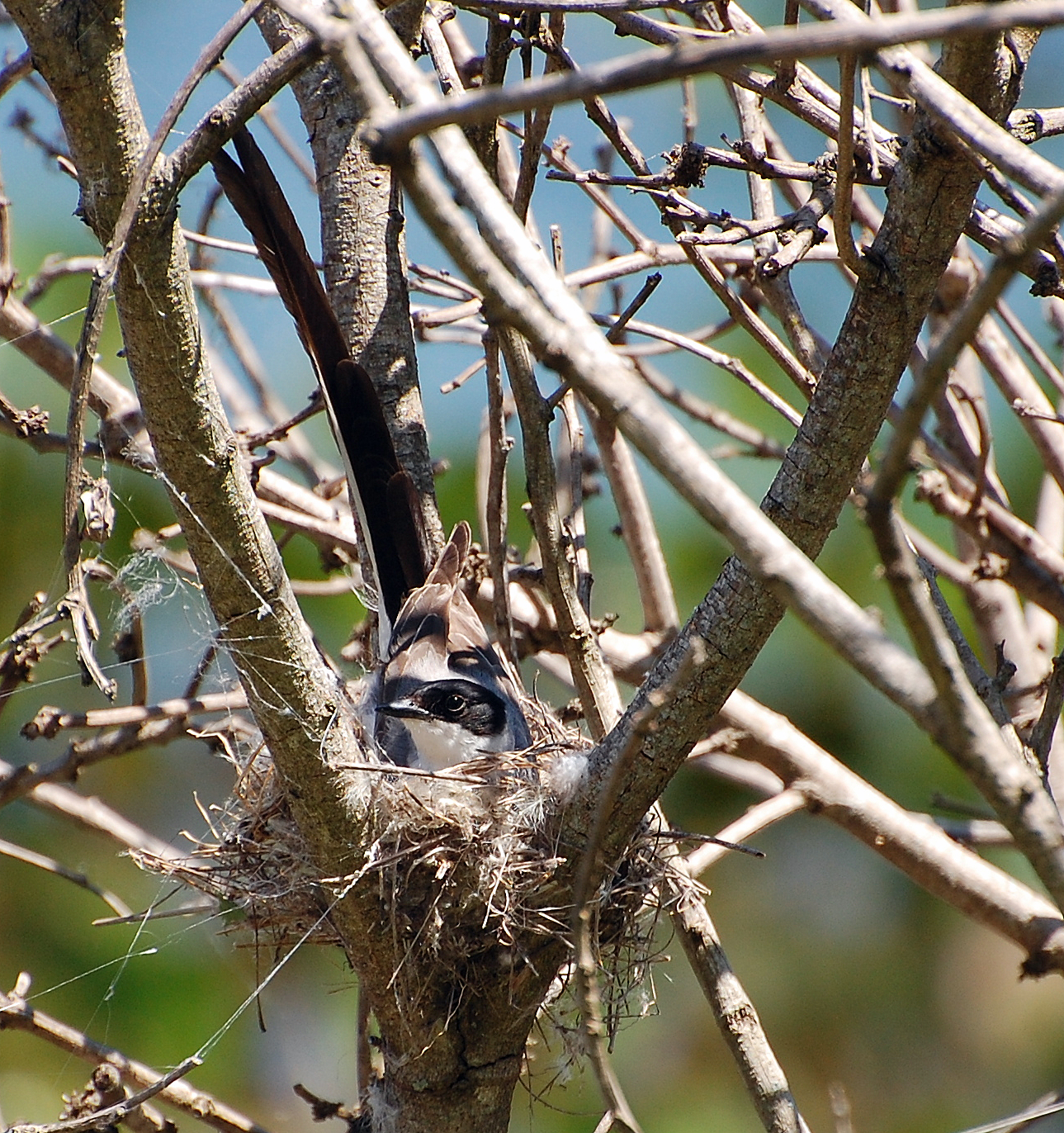 Margem do rio Paranapanema na cidade de Piraju-SP